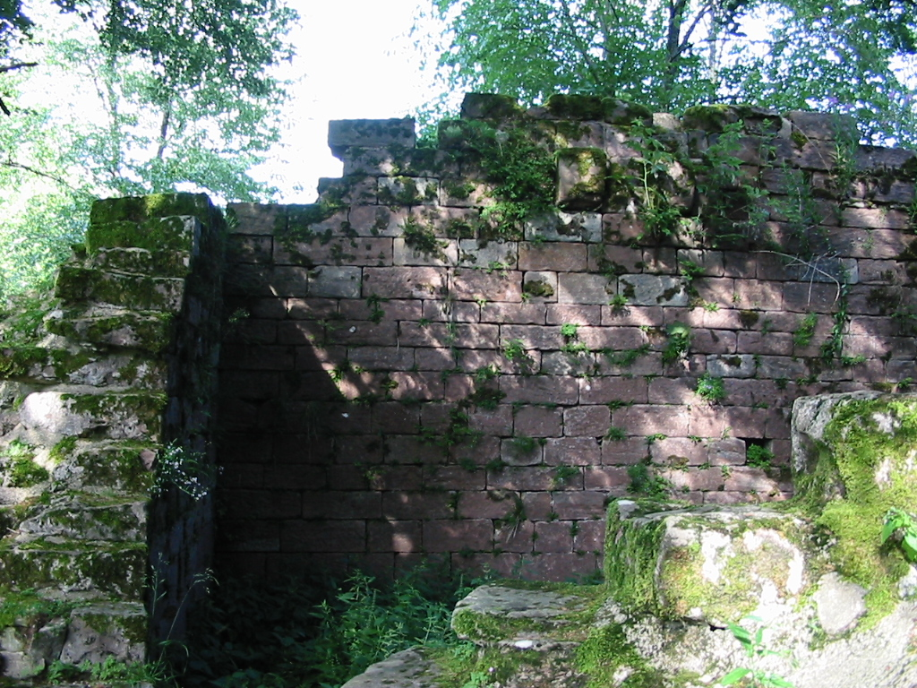 Château de Salm Commune de La Broque (Bas-Rhin) Ruines d'un château des comtes de Salm (début XIIIe siècle) Photographie personnelle, prise le 31 juillet 2005 Copyright © Christian Amet